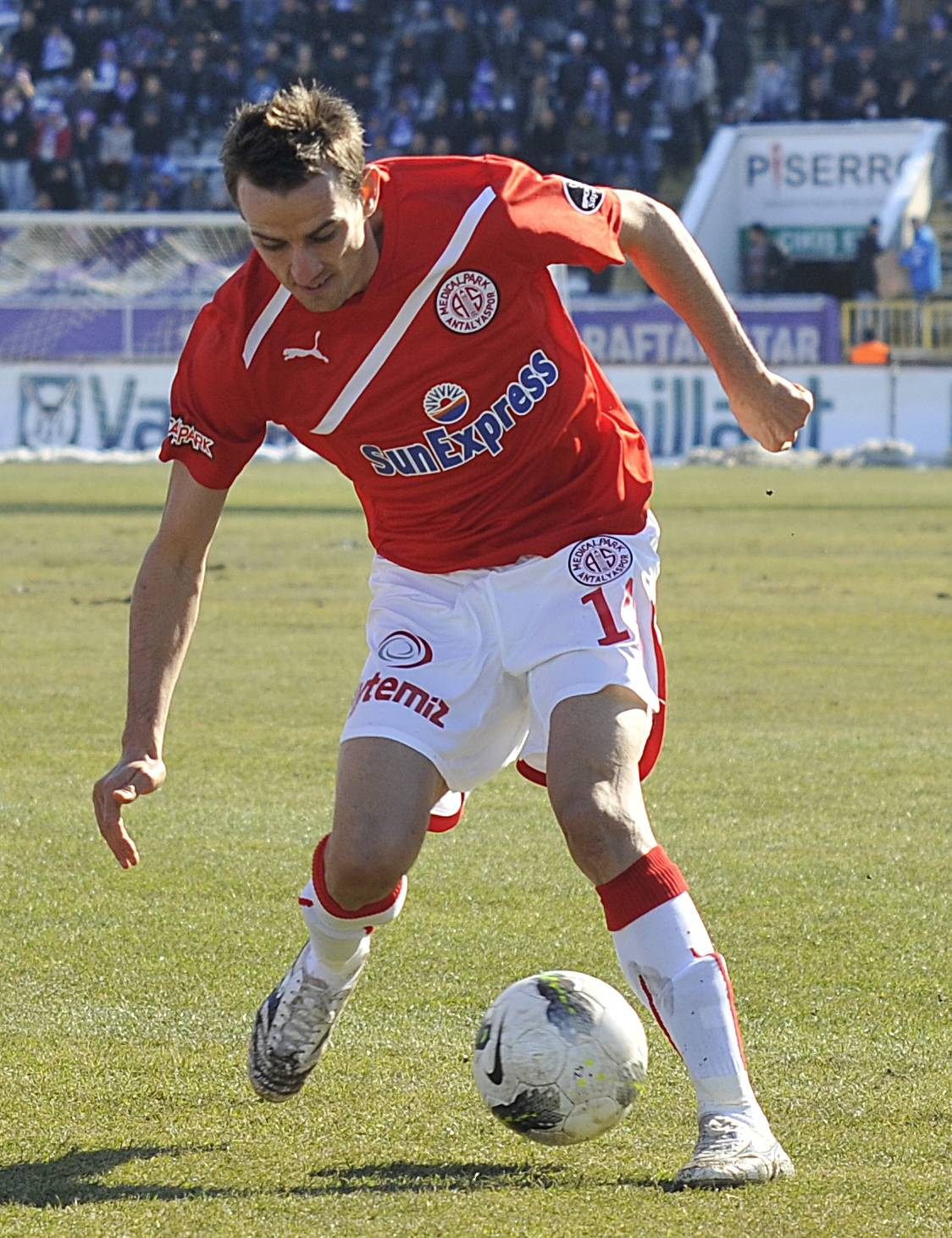 Photo : Murat Özgen